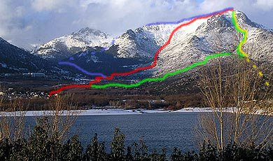 Rutas de ascenso a La Maliciosa (Comunidad de Madrid, España).